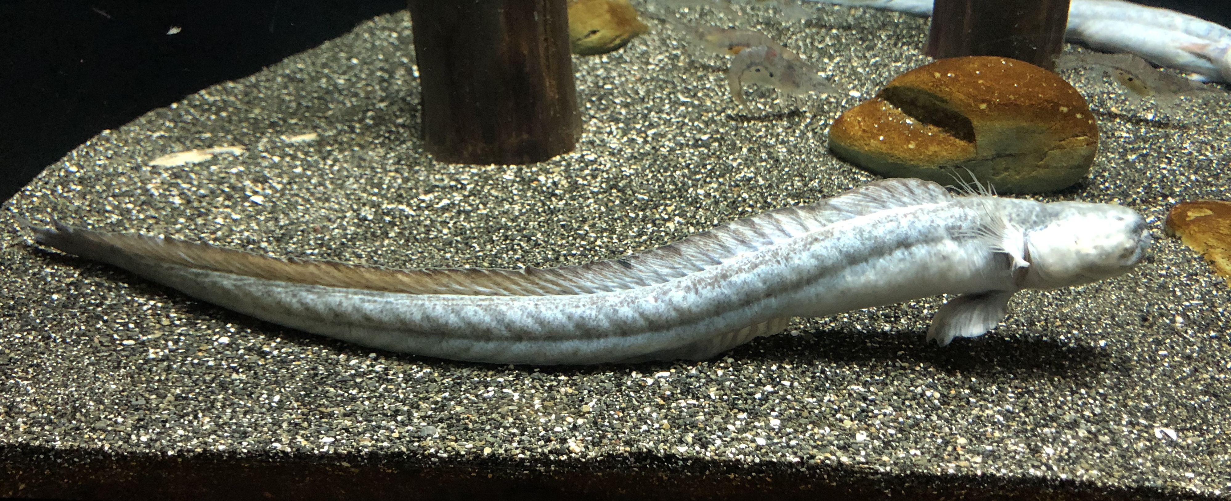 ワラスボ。マリンワールド海の中道飼育個体。